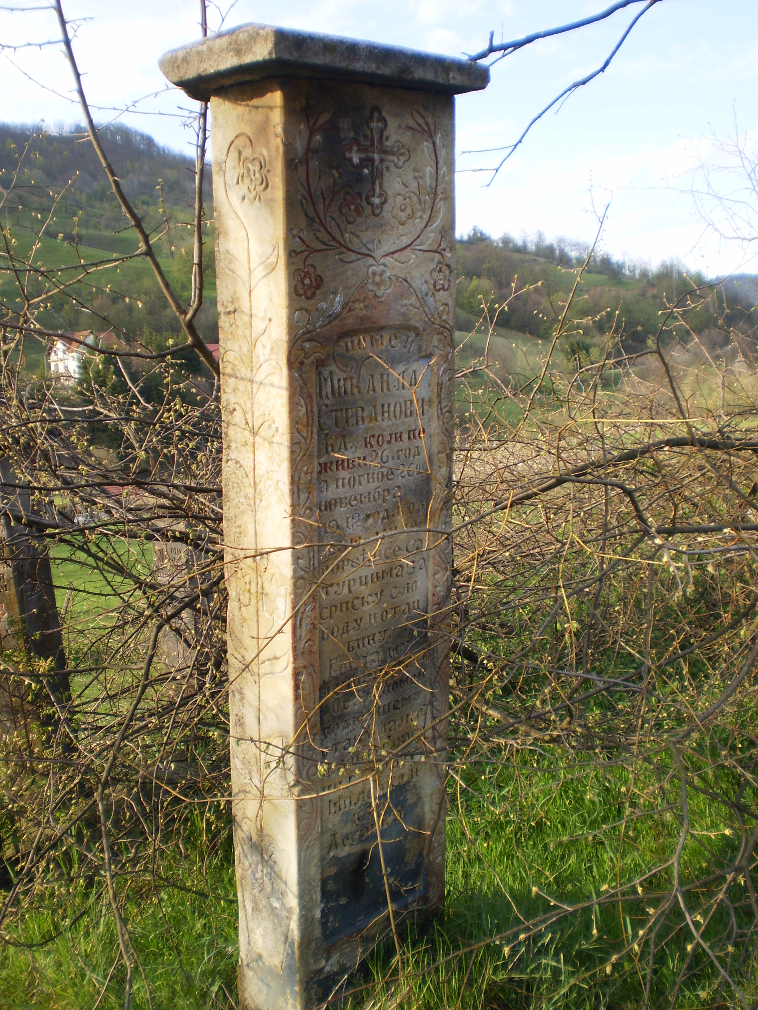 Српски (ћирилица): Споменик (Крајпуташ) Микаилу Стевановићу 1912. Селиште